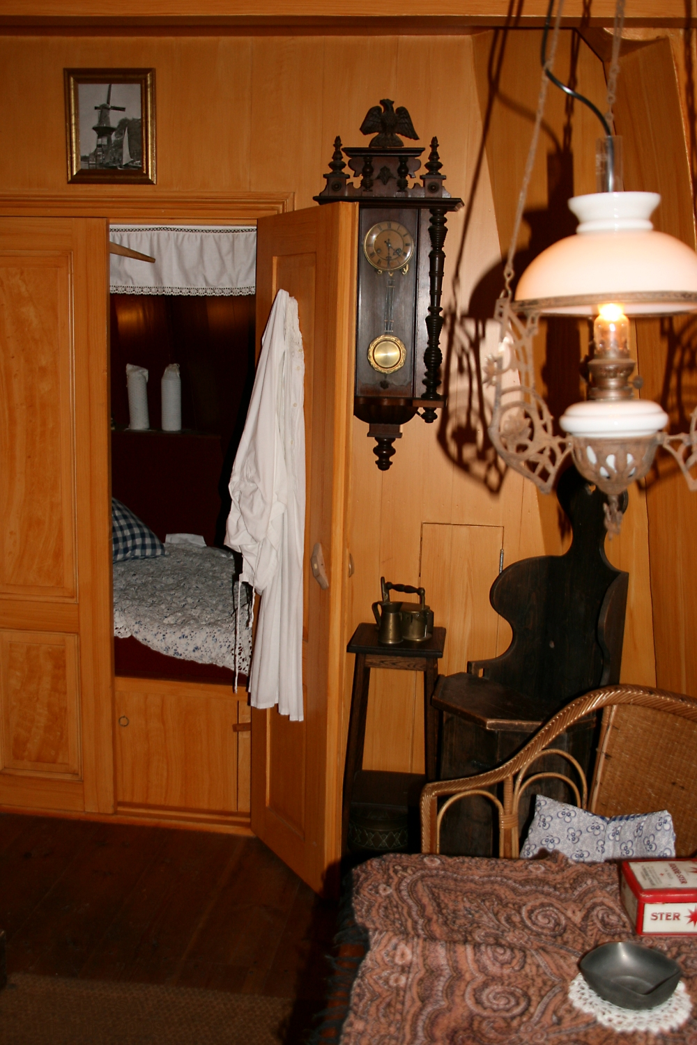 Etersheim: Etersheimer Braakmolen - interieur: tafel en bedstede